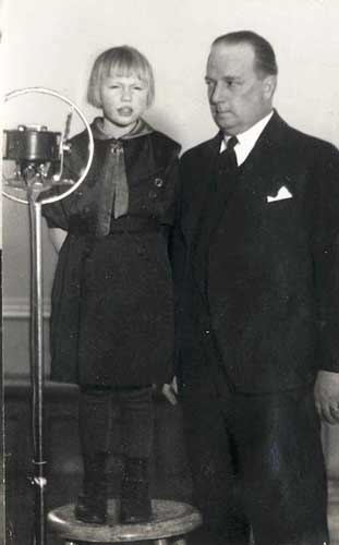 Markus-setä tekemässä kuopiolaisten lasten kanssa radio-ohjelmaa vuonna 1936. Kuvassa vasemmalla Hilkka Rissanen.